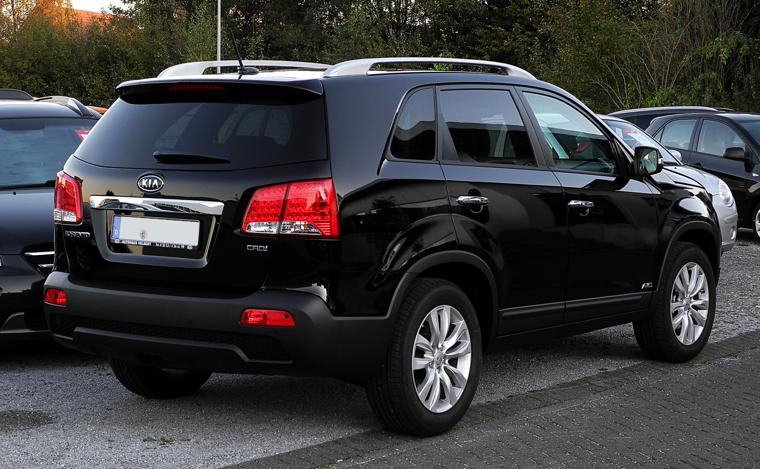 Kia Sorento 2.2 CRDi AWD Spirit (XM)